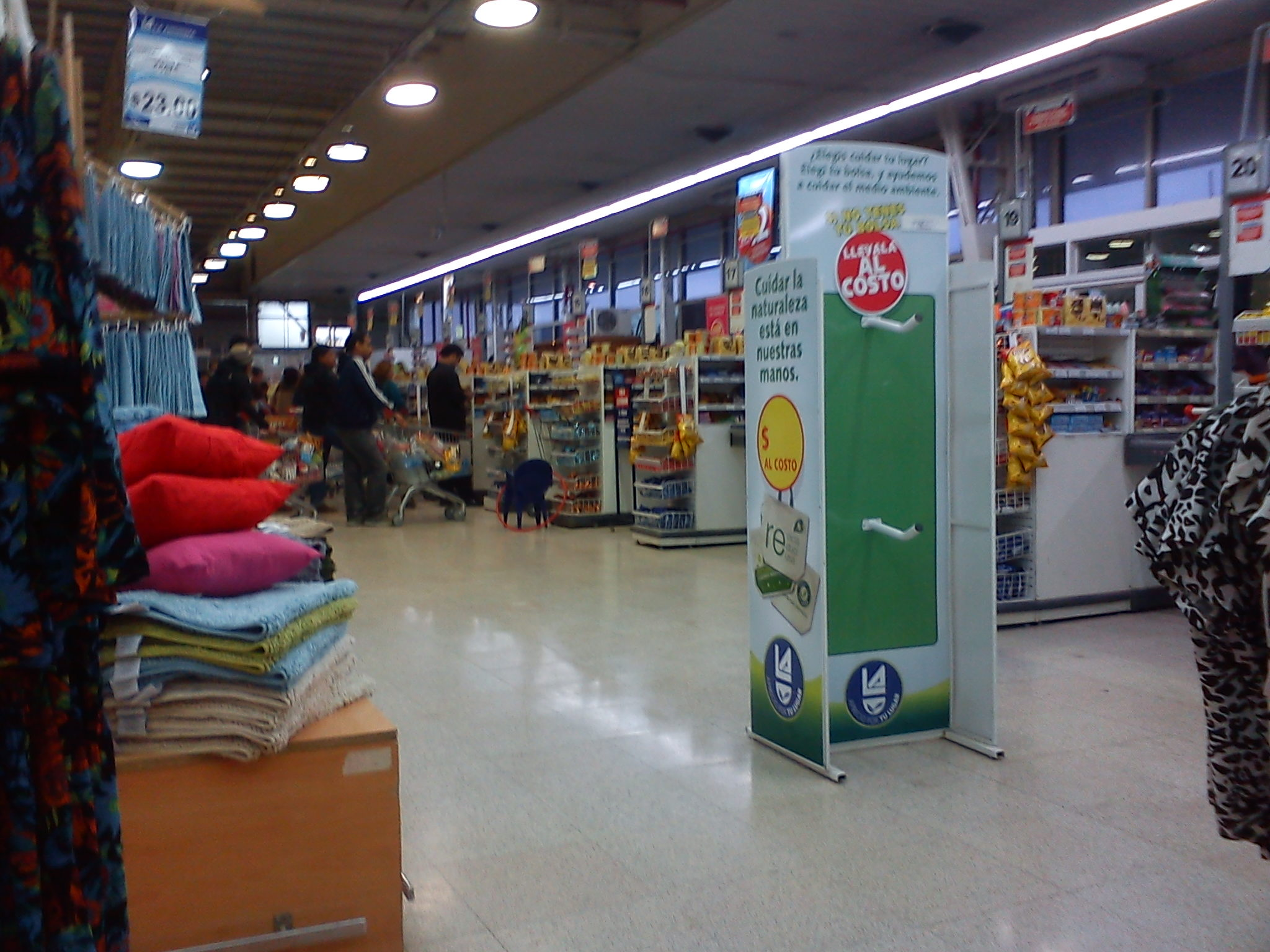 Vista del interior del supermercado